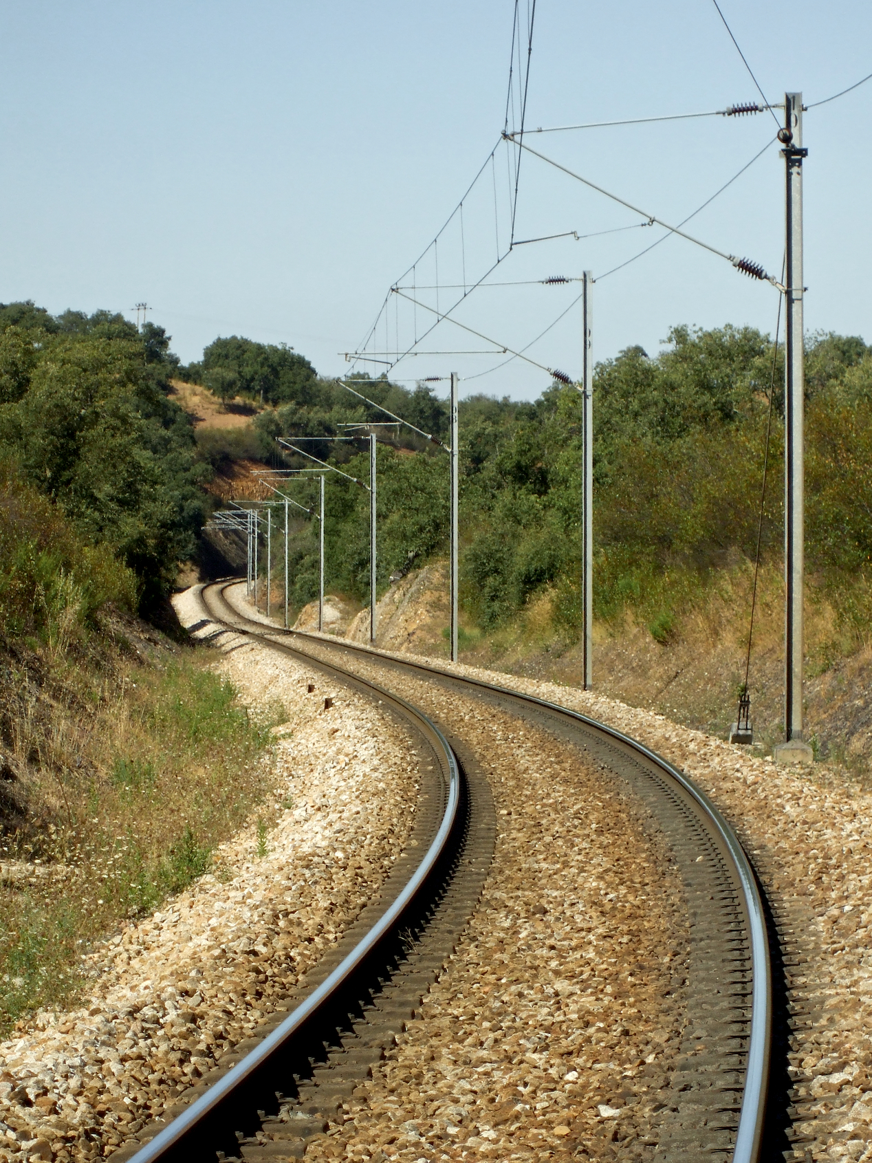 Via férrea: Linha de Sines [PK 156] Local: Cumeadas Data e hora: 23 de Julho de 2008 [17h16] Sentido: Ermidas • Sado